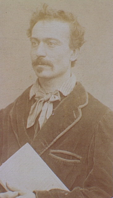 Georges Léon Arnold (1837-1912)